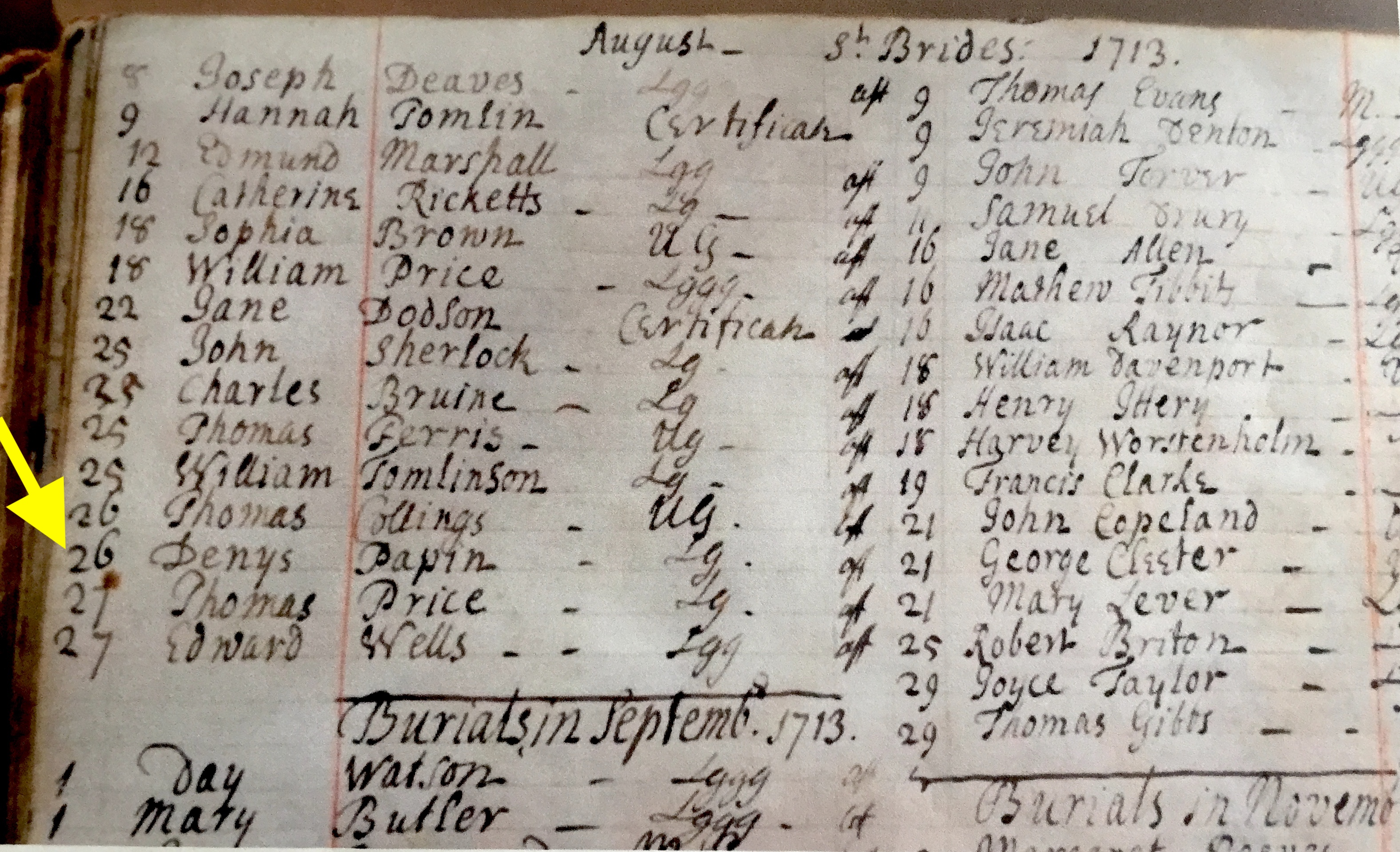 Denis (Denys) Papin, Todeseintrag, 26. August 1713, St. Bride's Church London, gefunden in London im "S' BRIDE'S REGISTER MARRIAGES BURRIALS FROM 1695 to Aug 1714" von Reinhard Stößel (Veckerhagen), Fundkopie liegt im Archiv Historisches Brauhaus Veckerhagen. Bisher war das Todesjahr als "vermutlich 1712" angegeben worden.